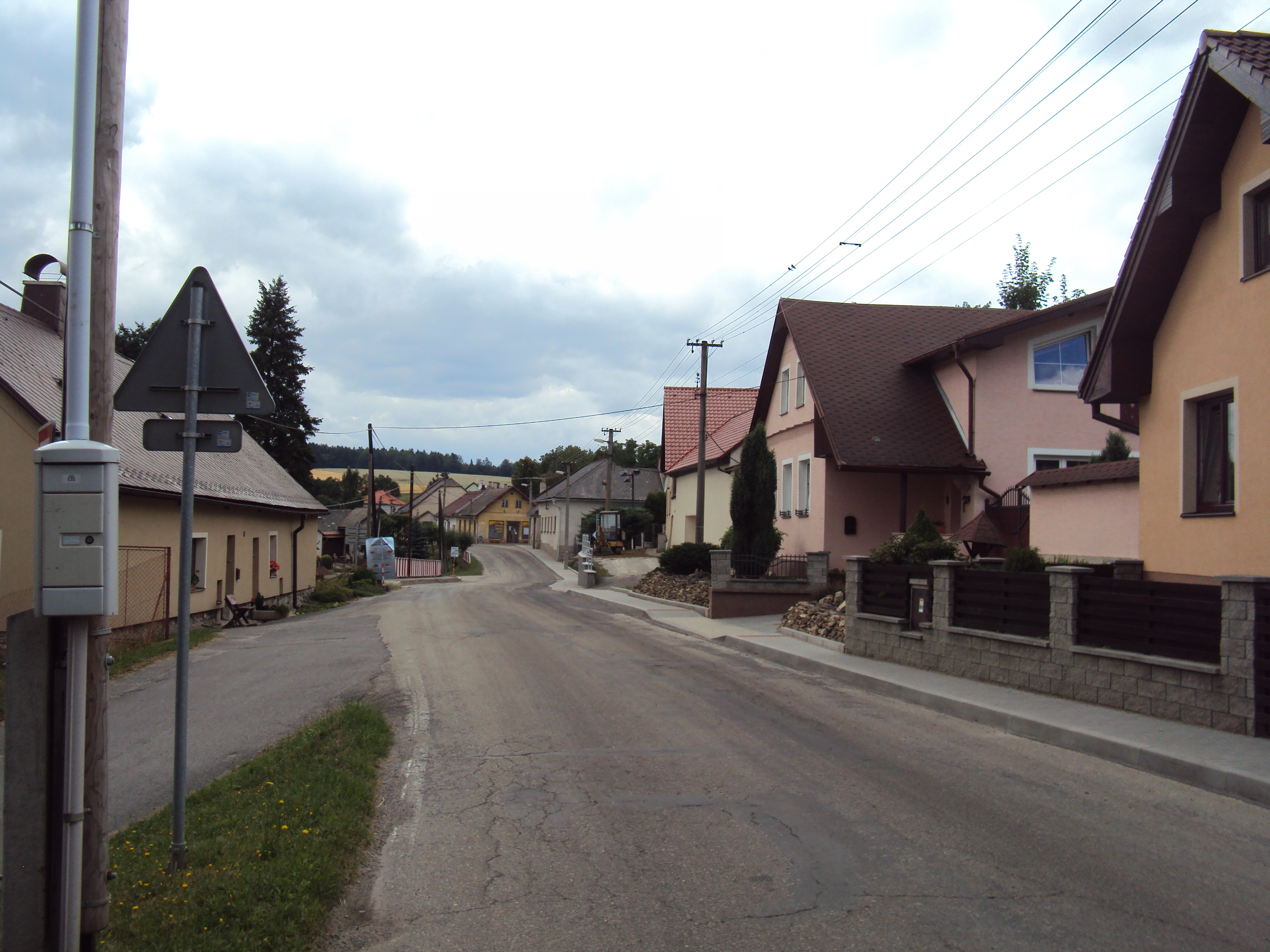 Smrčná, obec v okrese Jihlava